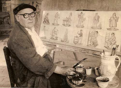 portrait du peintre et céramiste espagnol José Gimeno Martínez